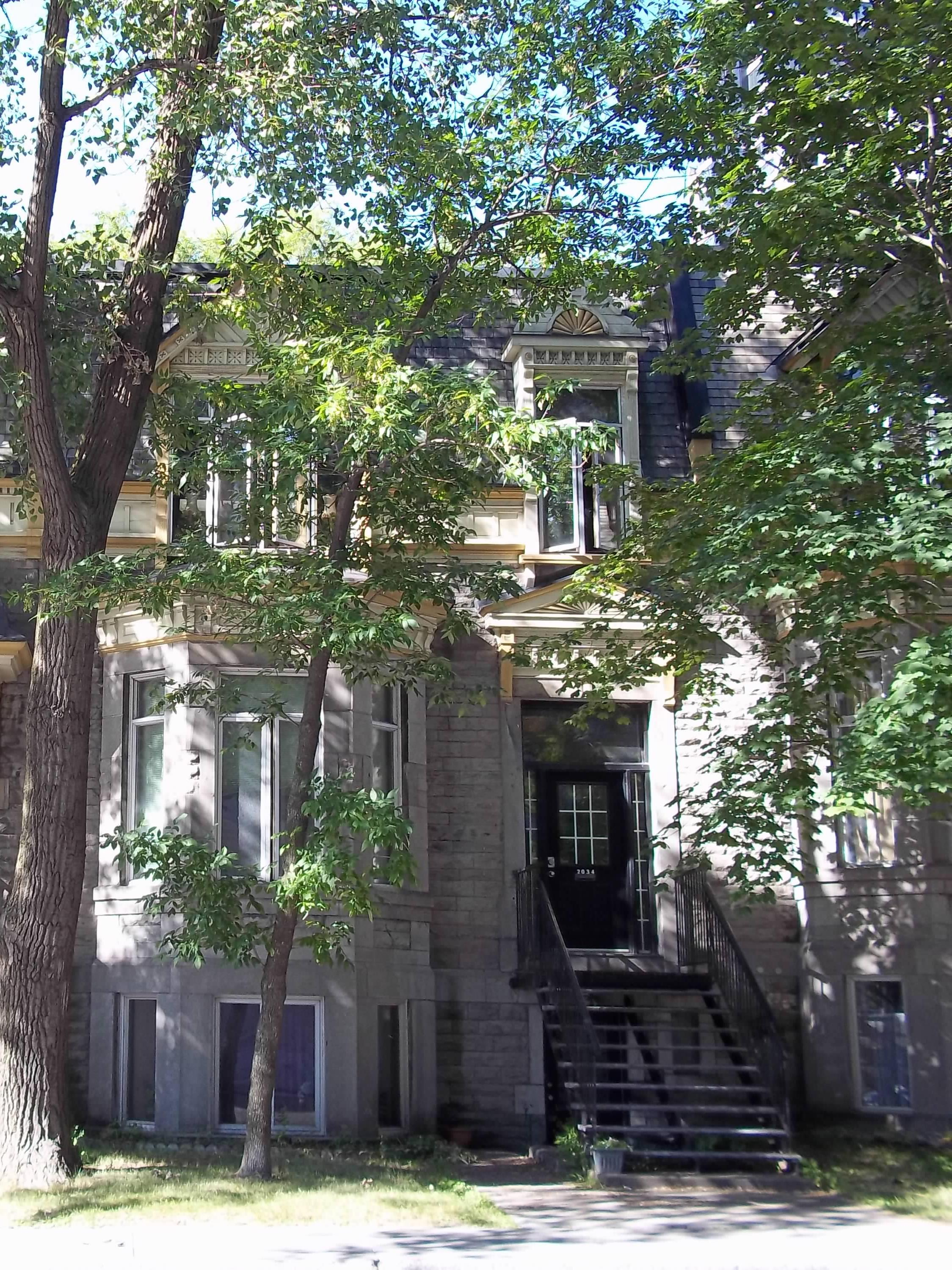 Maison William-Cairns, 2032-2034, rue Jeanne-Mance, Montréal